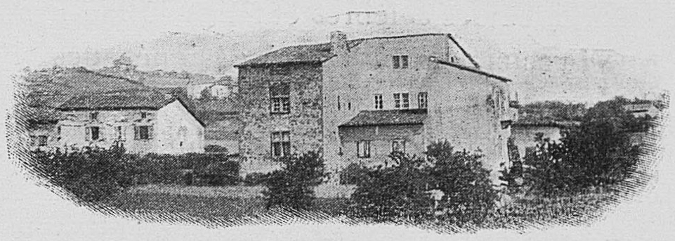 Dictionnaire illustré des communes du département du Rhône. Tome 1 / par MM. E. de Rolland et D. Clouzet.